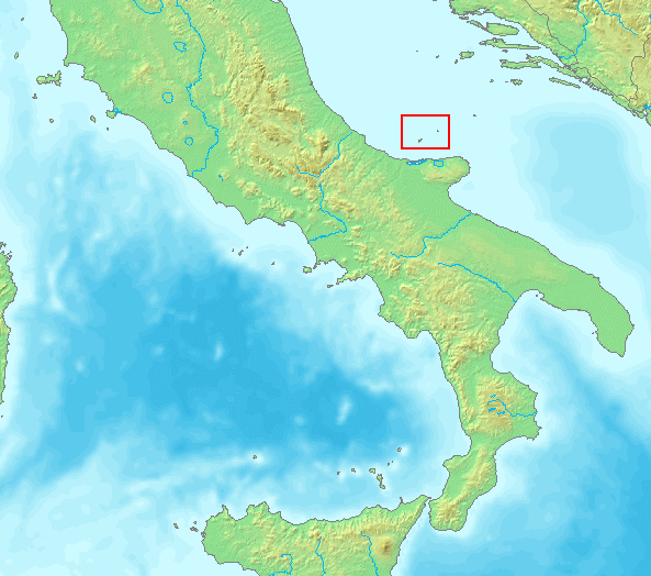 Tremiti